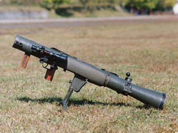 [口径]84mm [全長]1,130mm [重量]約16.1kg [給弾方式]手動/単発 [弾丸質量] ・対戦車りゅう弾 3.2kg（全備） ・りゅう弾 3.1kg（全備） [製作] ・輸入：FFV社（スウェーデン） ・国産：豊和工業